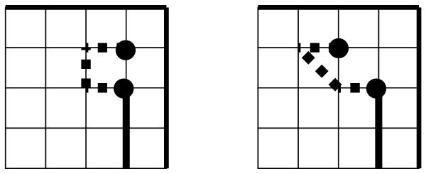 Два завала из одной позиции. Из издания "Мациевский С. В. Математическая культура. Игры: Учебное пособие. — Калининград: Изд-во Калининградского государственного университета, 2003. — 120 с., ил. — ISBN 5-88874-451-4. — Глава 4. Игры и головоломки. § 2. Футбол."